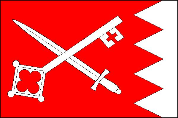 Vlajka obce Bartošovice